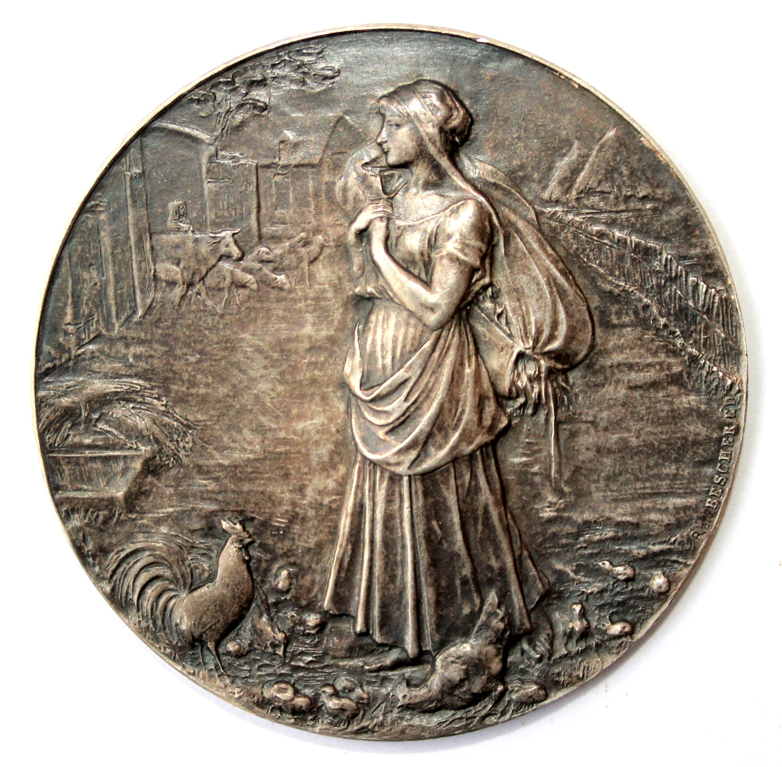 Fermière dans la basse-cour, médaille de comice agricole réalisée par Oscar Roty éditée par Bescher